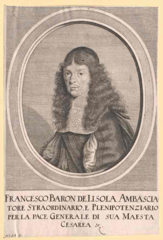 Franz Paul de Lisola. Kupferstich von Johann Jakob Schollenberger, Nürnberg